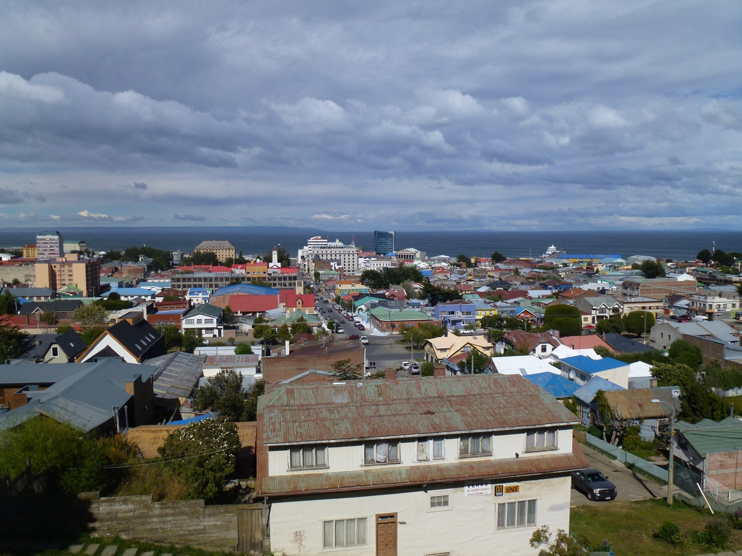 Cerro de la cruz Punta Arenas Chile